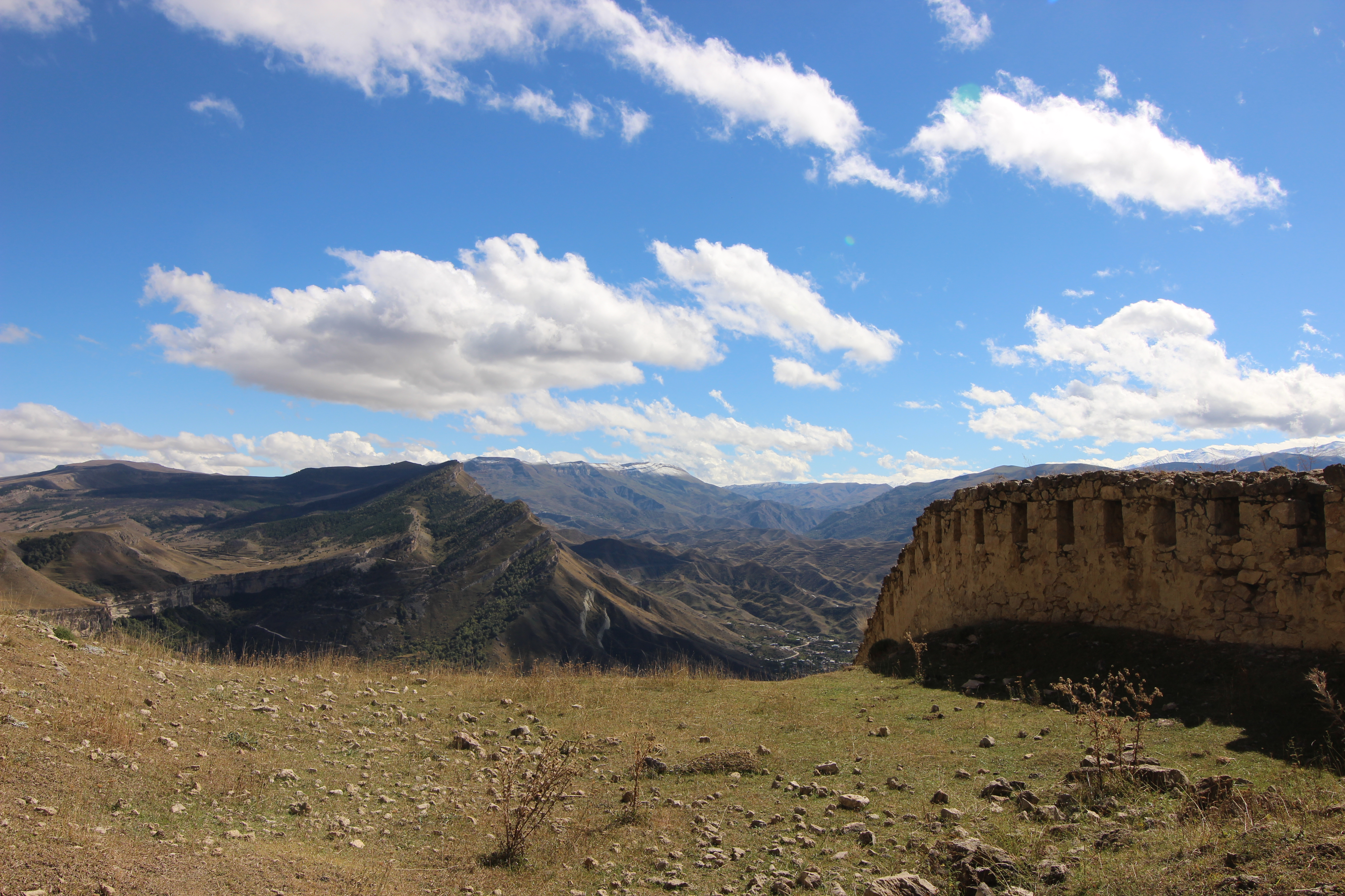 Горный ботанический сад 'Гунибское плато': Верхний Гуниб и правобережье р. Казикумухское-Койсу, Гунибский район, Дагестан This image is related to the protected area of Russia number 0500009